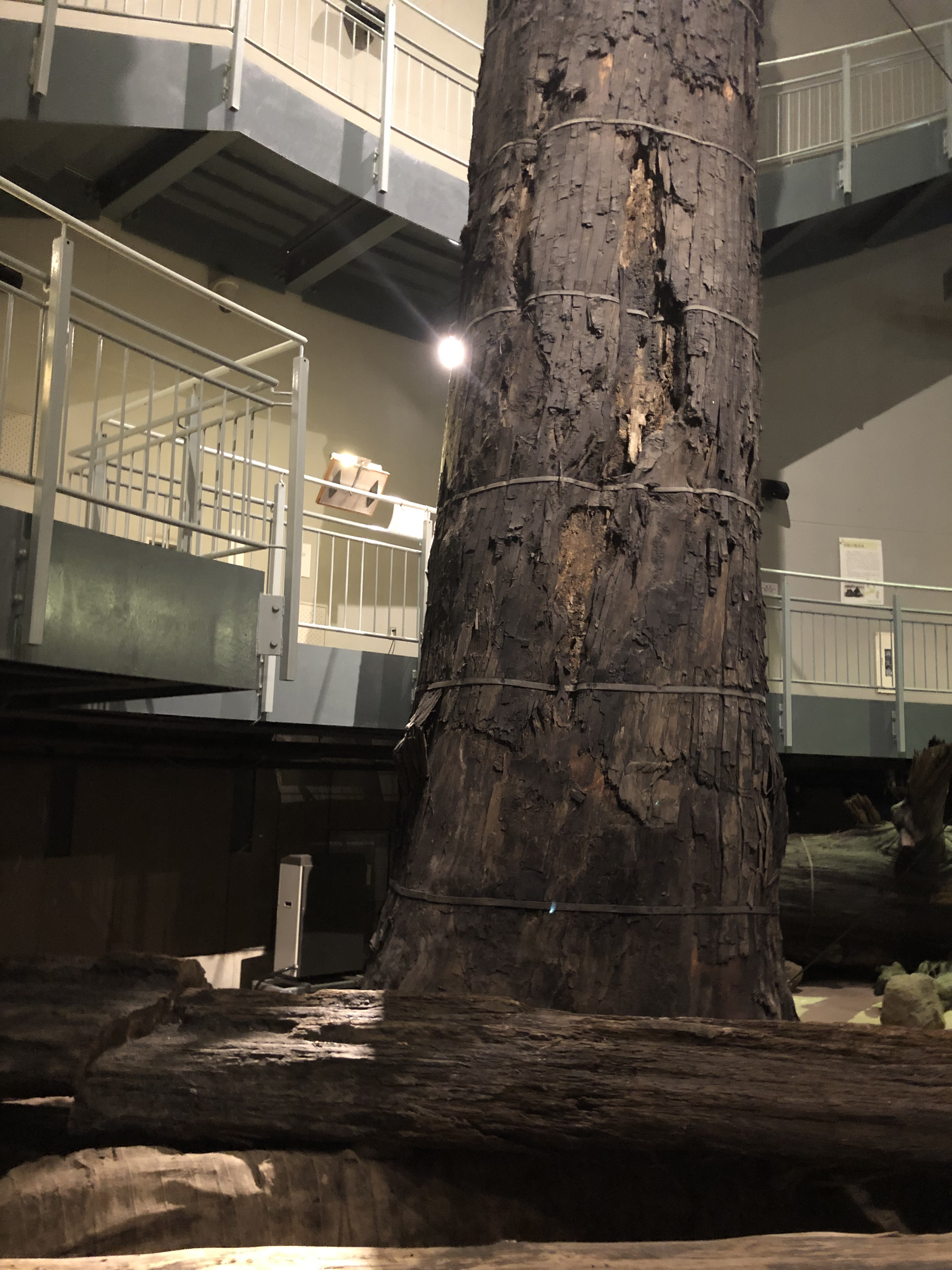 4000年前の噴火により一瞬により埋没した林が炭化されるずに発掘された。